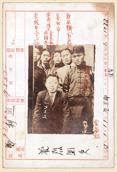 義烈団 初期